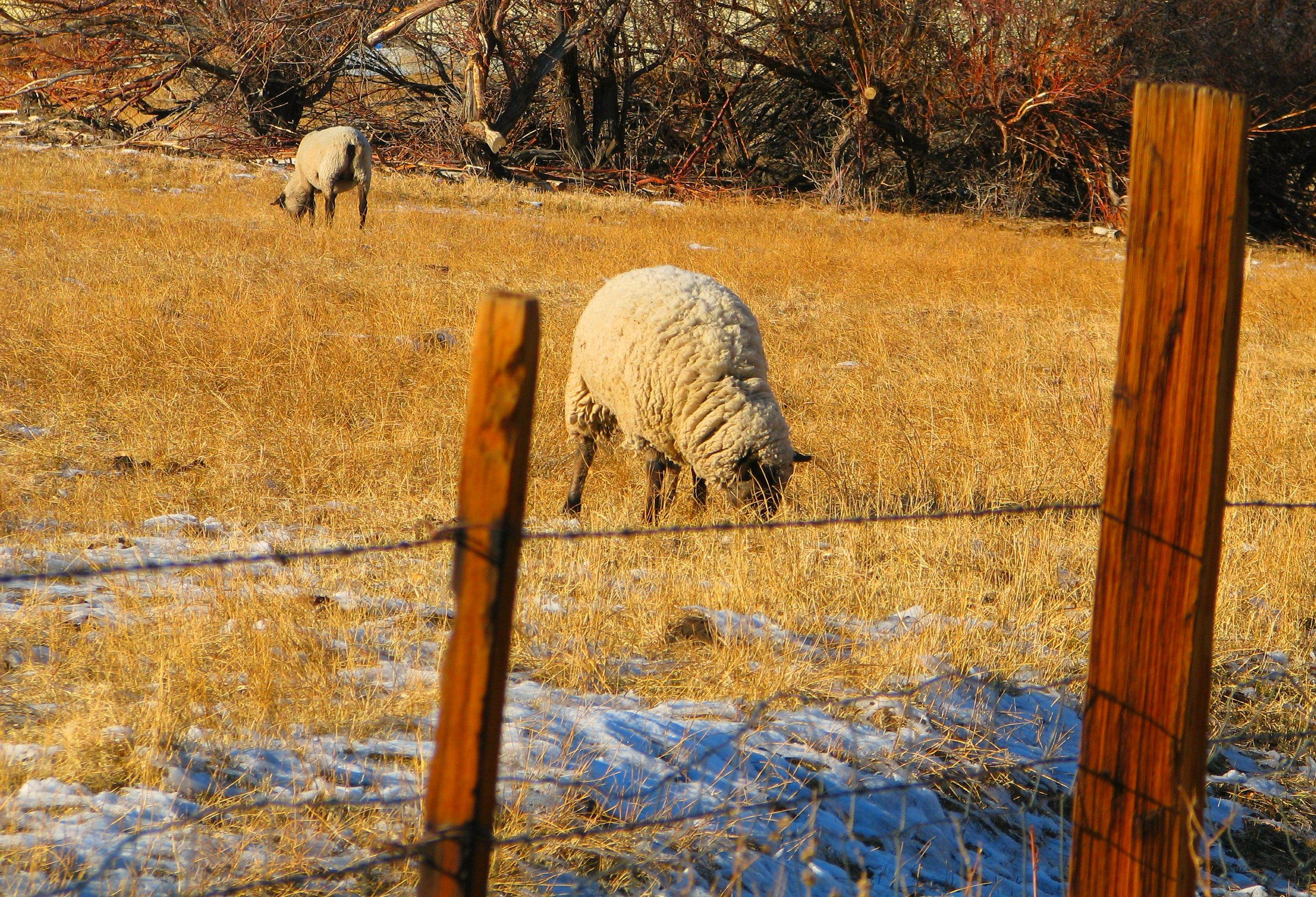 sheep